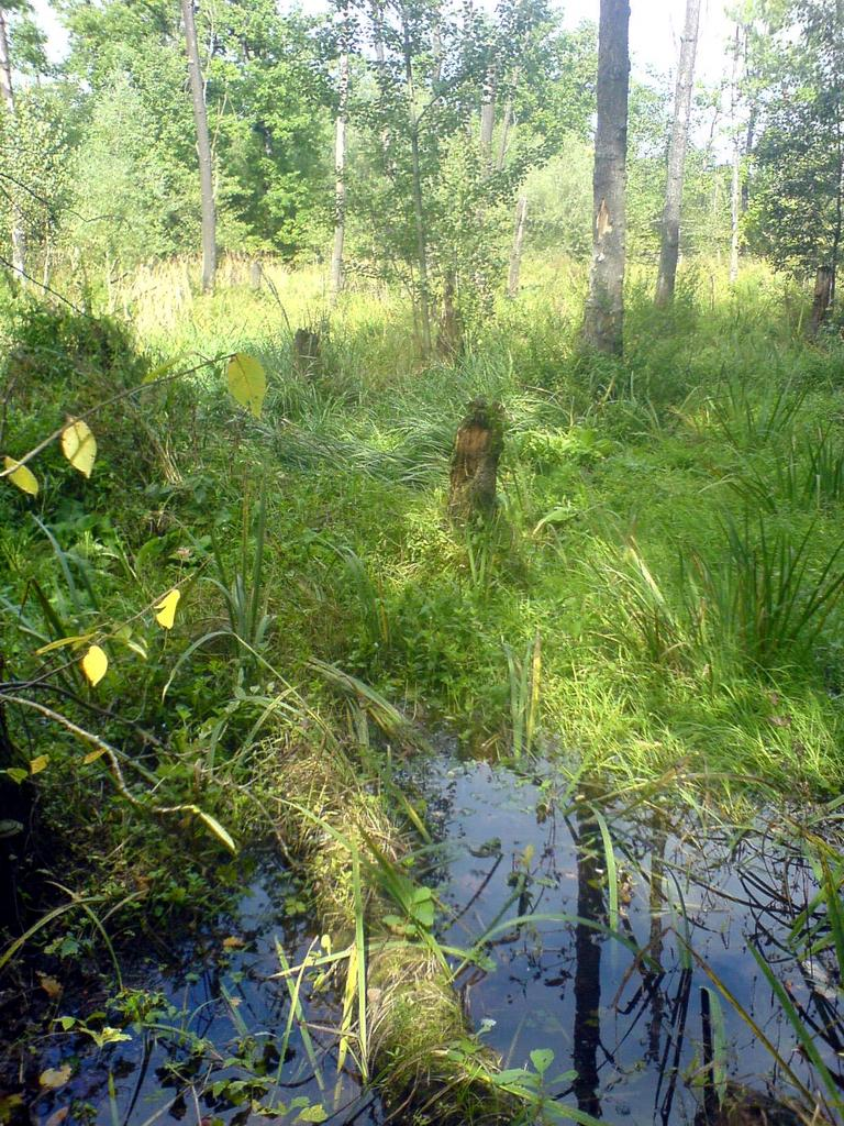 Česky: Obrázek ze zvláště chráněného území - Přírodní památky Turkov - ohroženého některými ze zvažovaných variant tzv. Severního spoje. Ostrava - trojmezí městských obvodů Třebovice, Poruba a Martinov